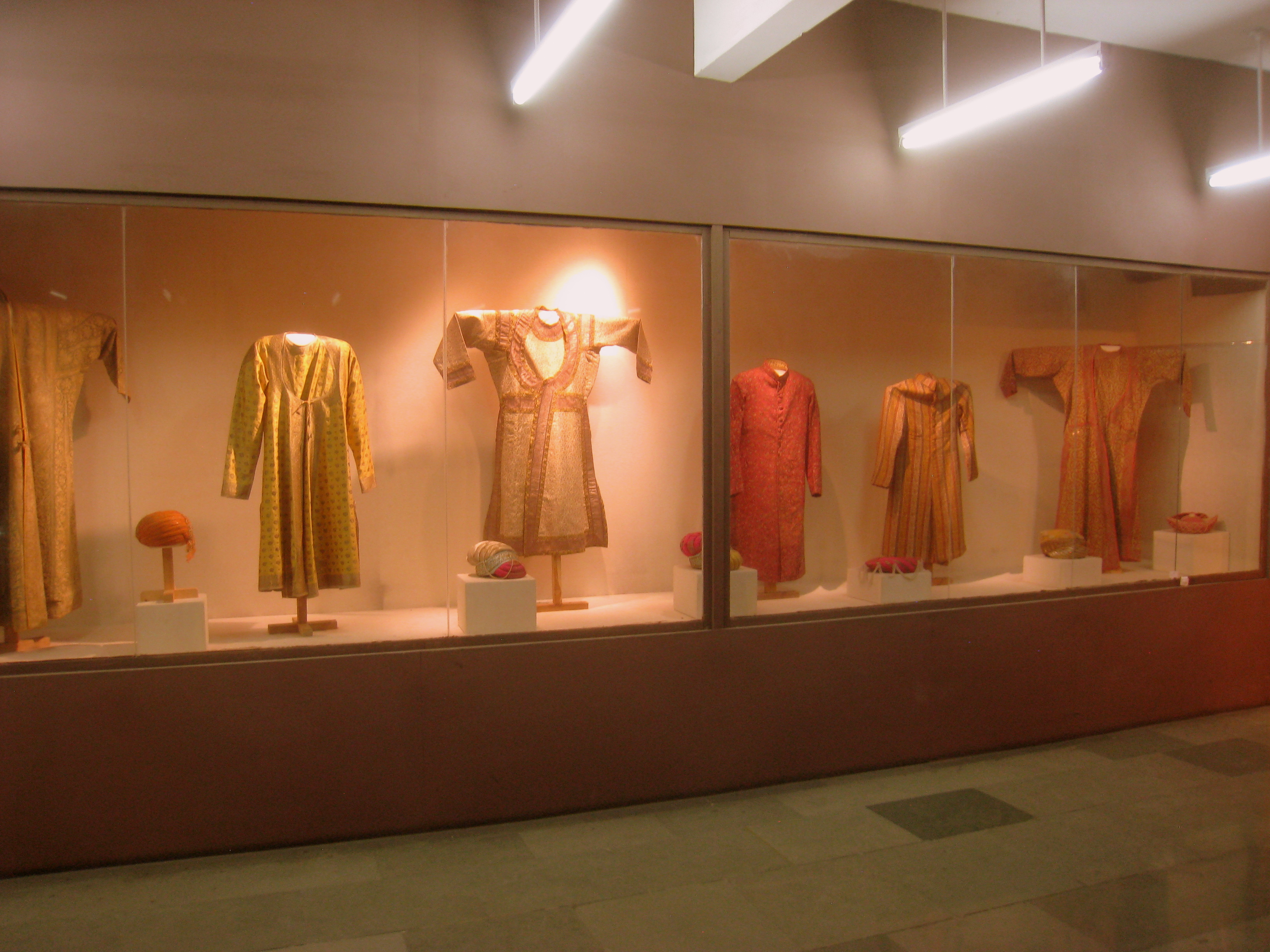 Exhibit in Crafts Museum, New Delhi, India.